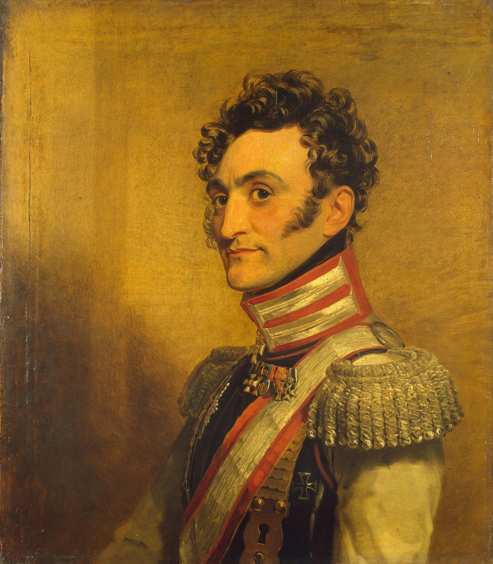 Vladimir Ivanovich Kablukov 2-nd (05.10.1781 – 19.02.1848) russian general